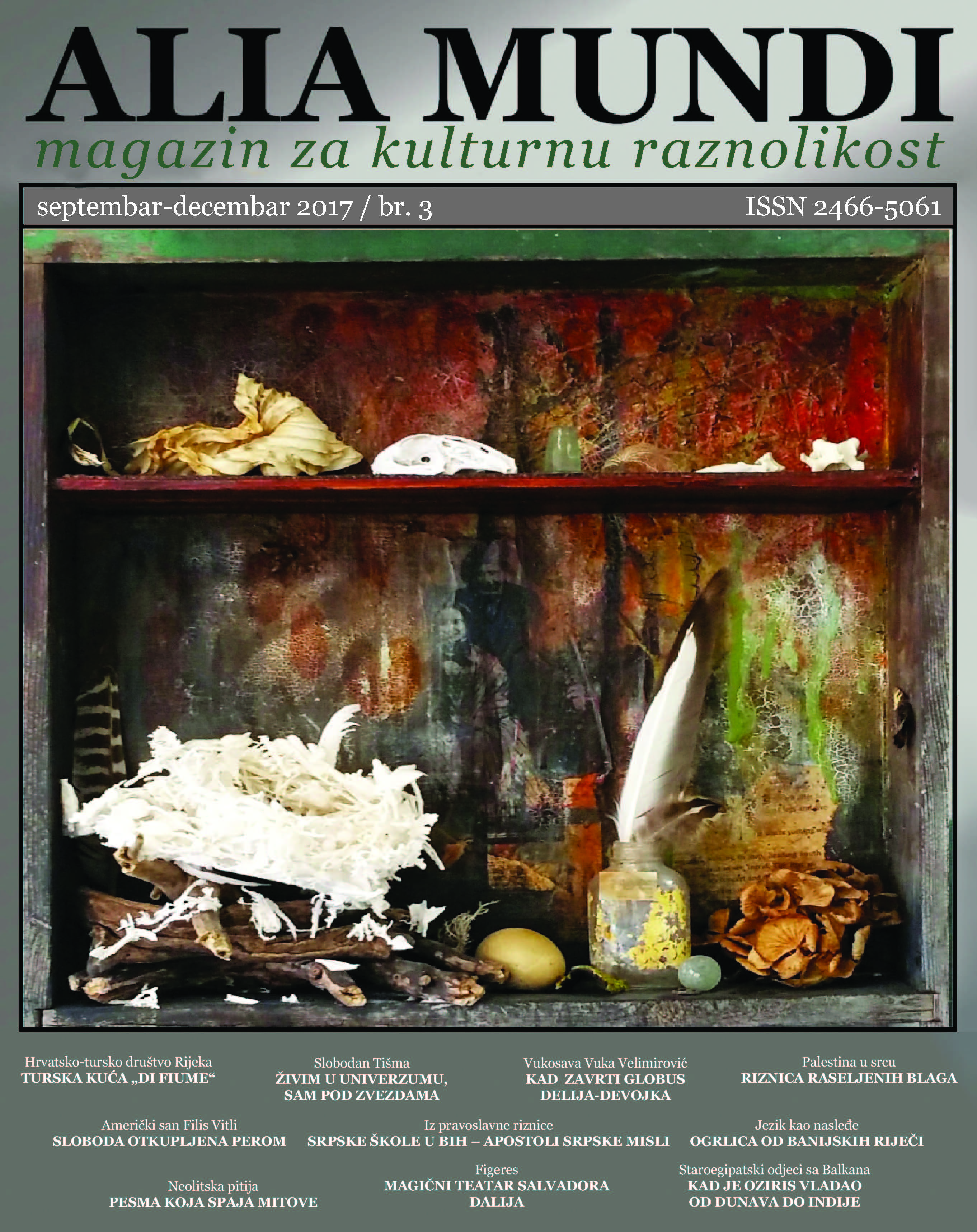 Srpski (latinica): Naslovnica 3. broja magazina Alia Mundi za kulturnu raznolikost, (septembar-decembar 2017.) umetnički rad „Sakupljač“ ("Collector") engleske umetnice Dawn Adams